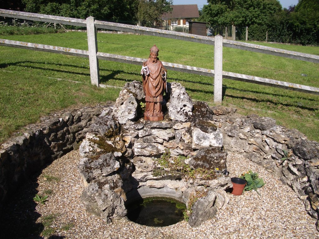 Source de saint Ursin Villers sur le Roule (Eure)